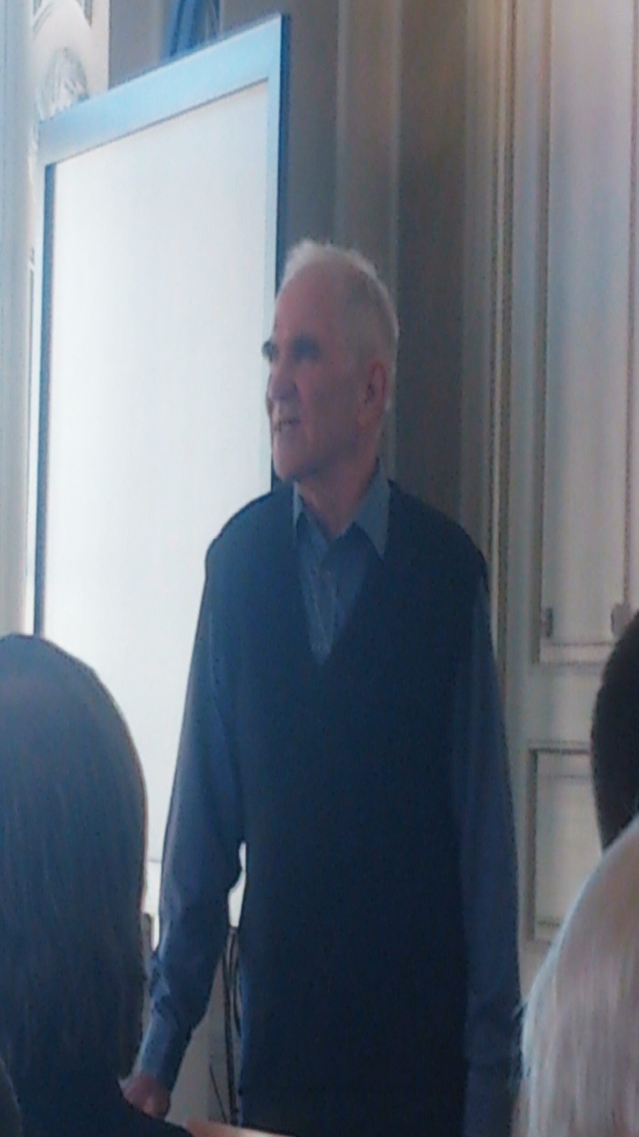 Kartograaf Tõnu Raid Tartu kaartide raamatu esitlusel Tartu raekojas 12. märtsil 2015